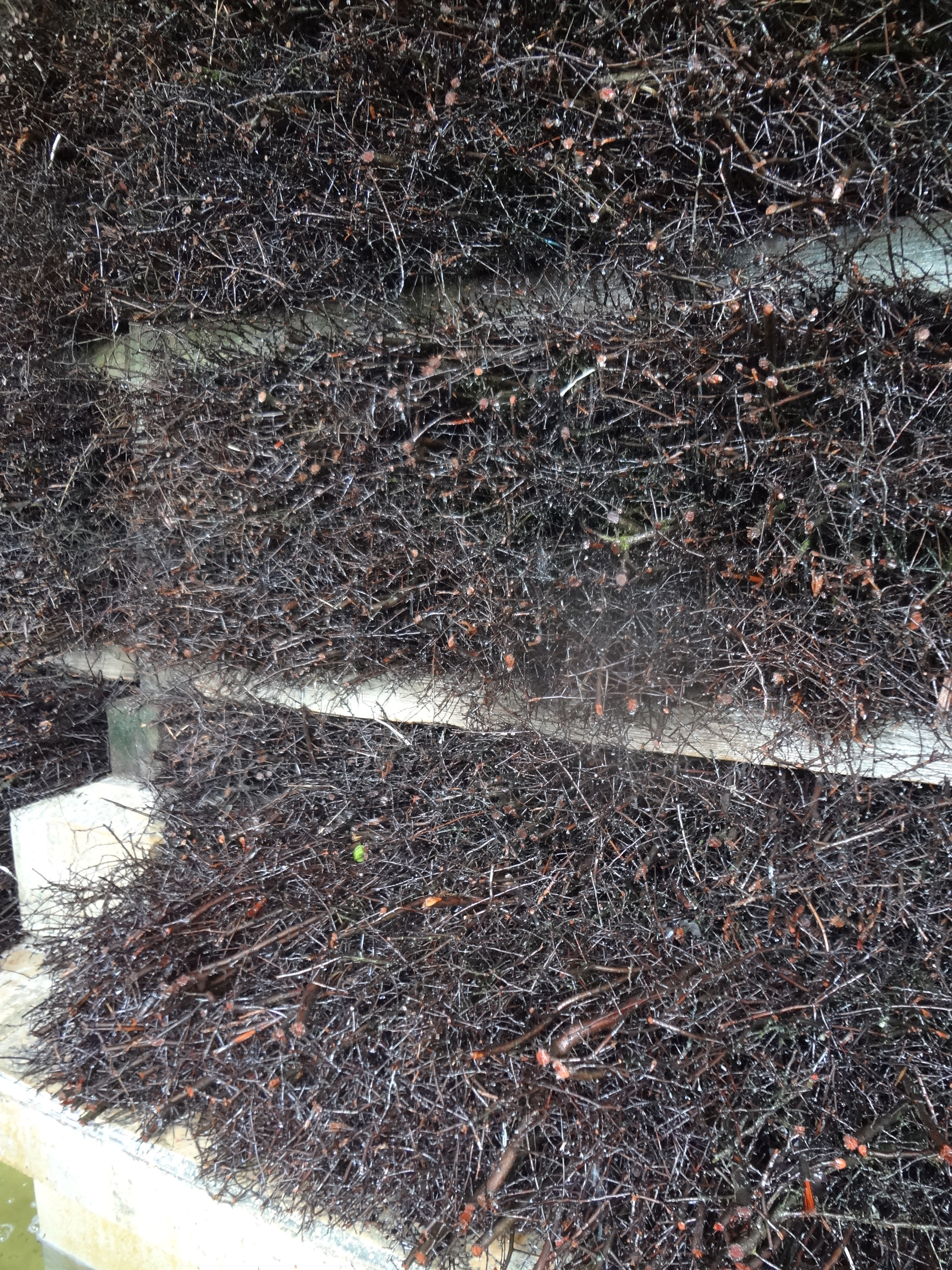 Vue de la promenade de l' «inhalateur extérieur de saumure alpine» (Gradierwerk). Détail sur les fagots de prunelliers.